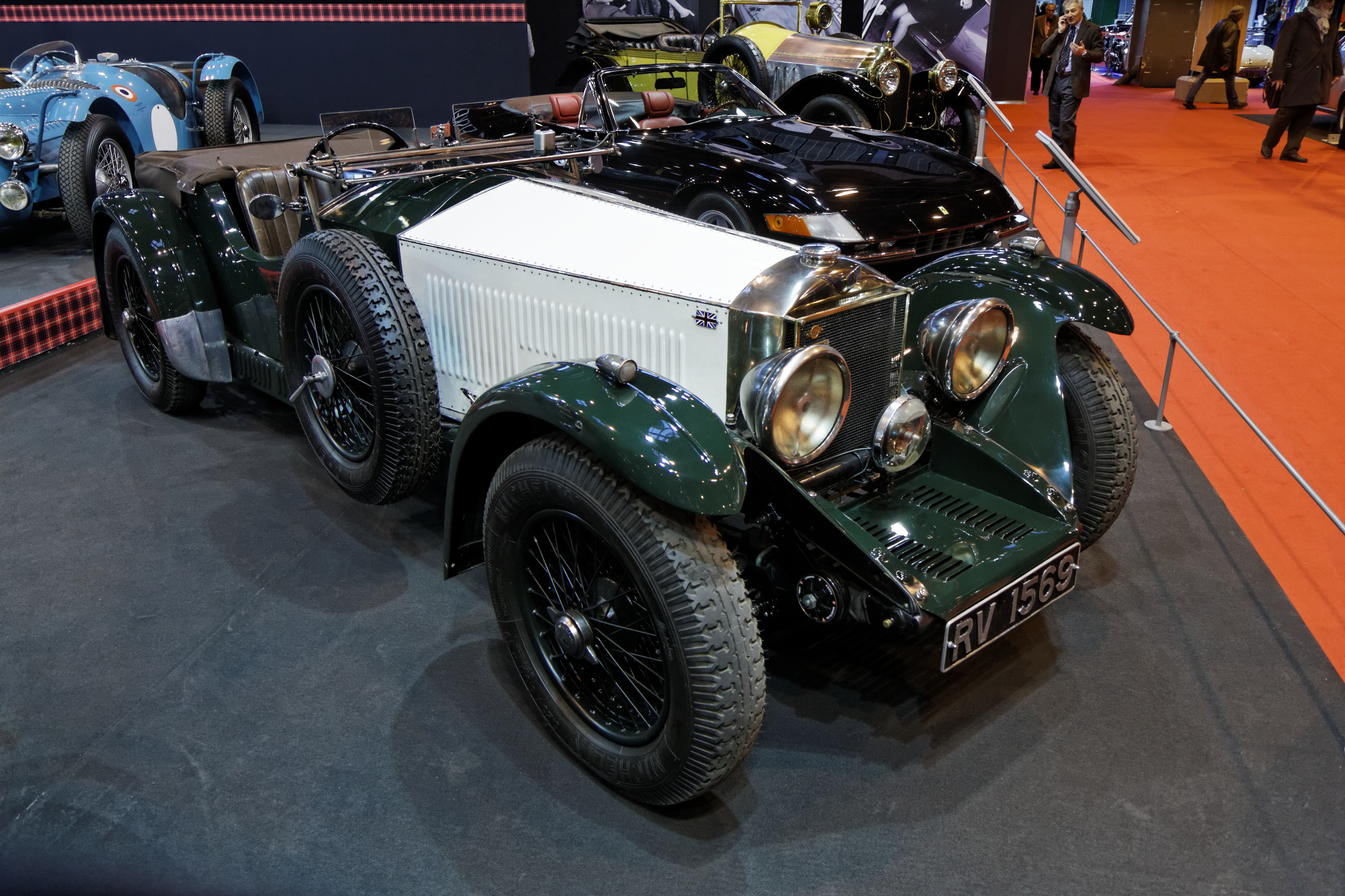 Une Invicta 4½ Litre S-Type Low Chassis exposée lors du salon Retromobile 2014.